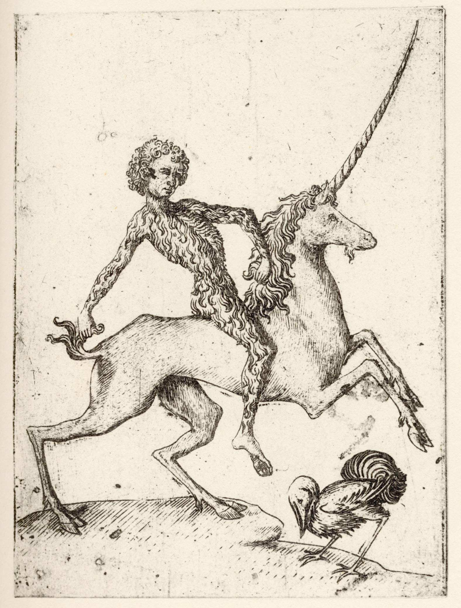 Vogel-Unter, Das große Kartenspiel, Kupferstich; Bird-Jack, The great pack of cards, etching, L. 269